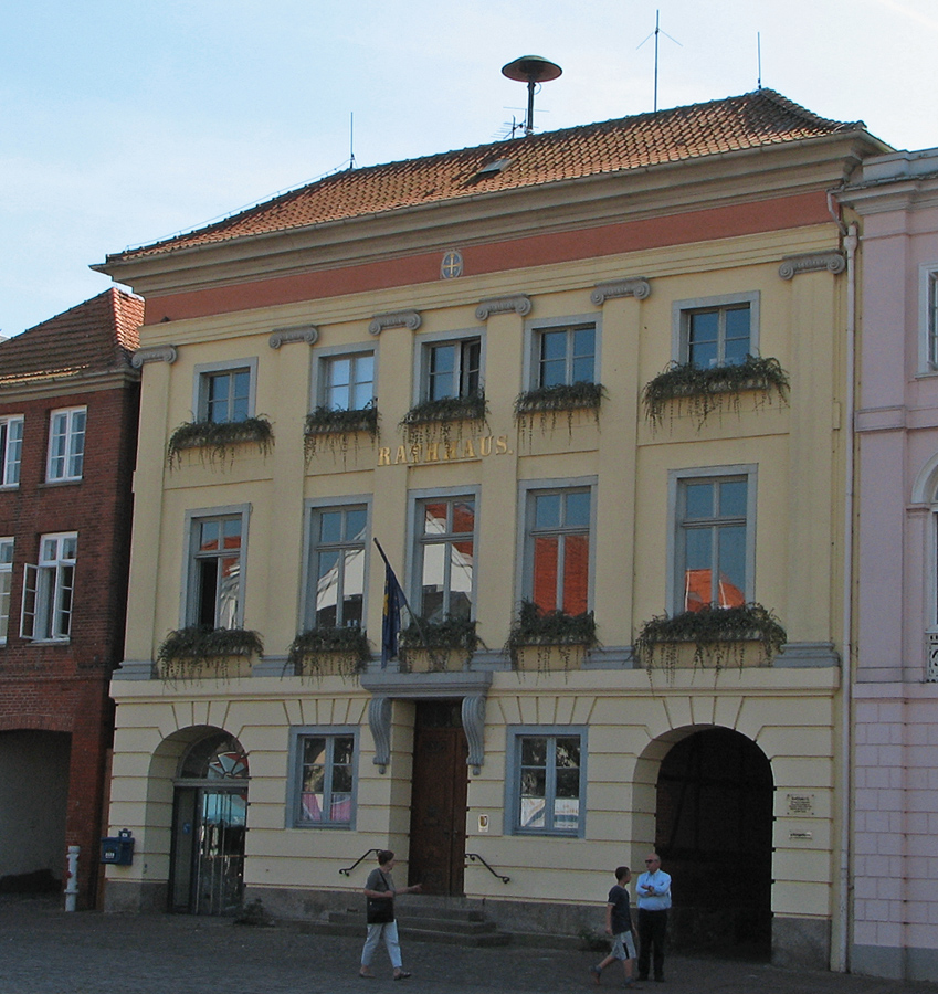 Beschreibung: Rathaus von Eutin / Germany Fotograf: Darkone, 5. September 2005